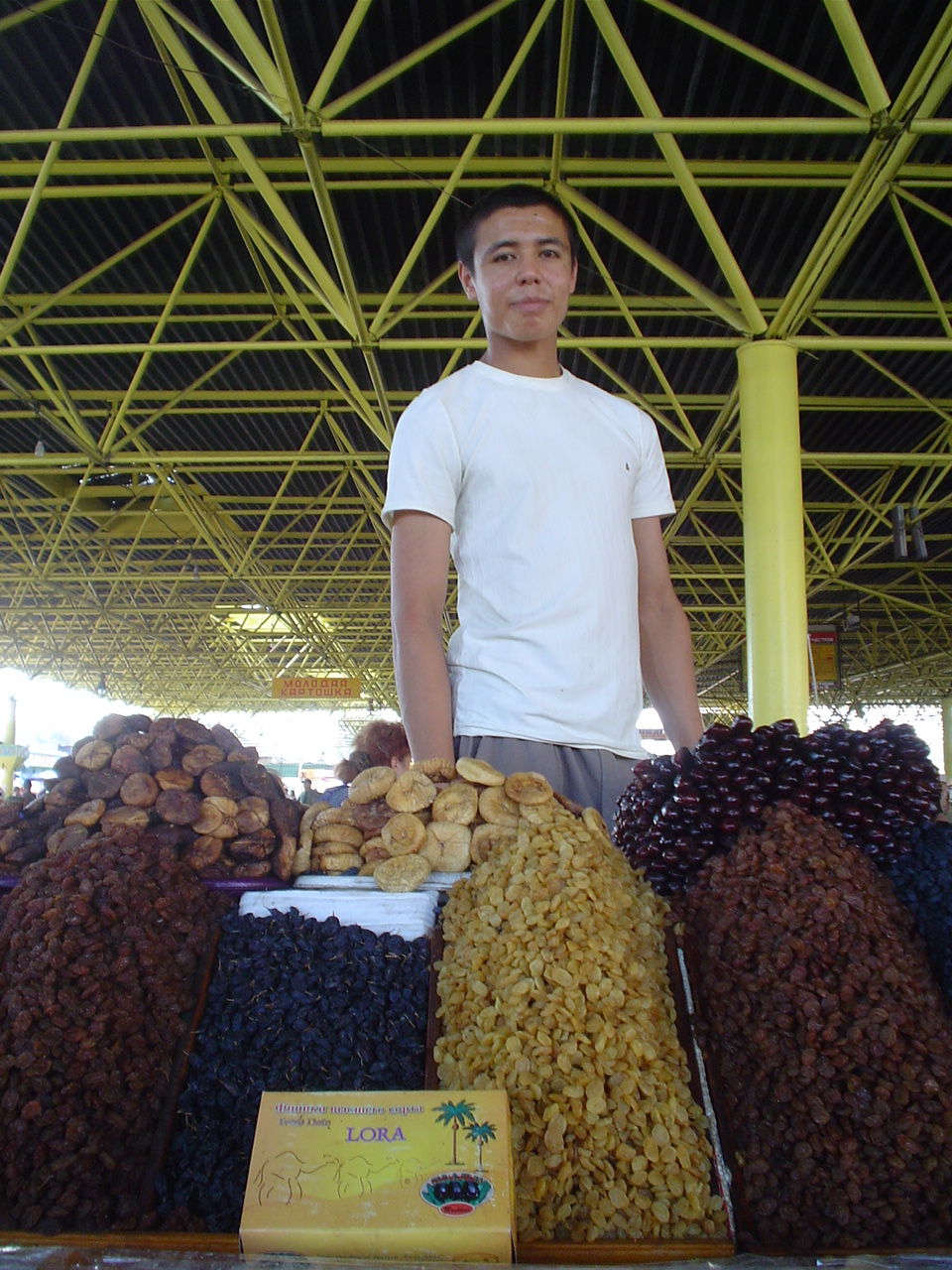 Odessa Ukraine bazaar